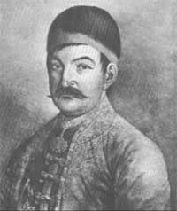 Тома Вучић Перишић, портрет је 1840. начинио Јован Исаиловић (литографија) Извор: (сајт за који имамо дозволу)